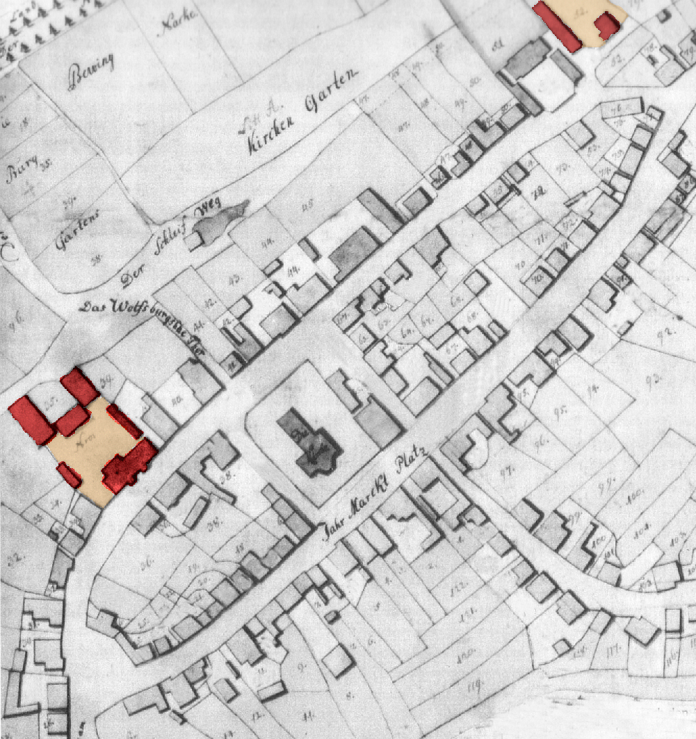 Plan von Vorsfelde von 1771 mit Sitz des Vorwerks Vorsfelde, oben rechts Amtsschäferei